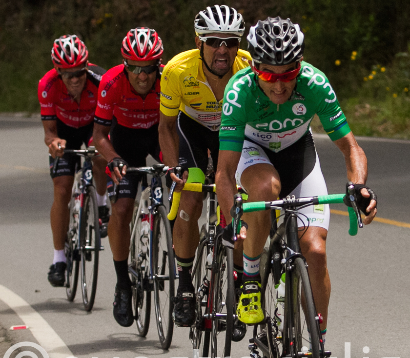 Eta12. Vuelta a Colombia 2015 - Viernes 14 de agosto de 2015 - Ituango - Bello (150Kms)